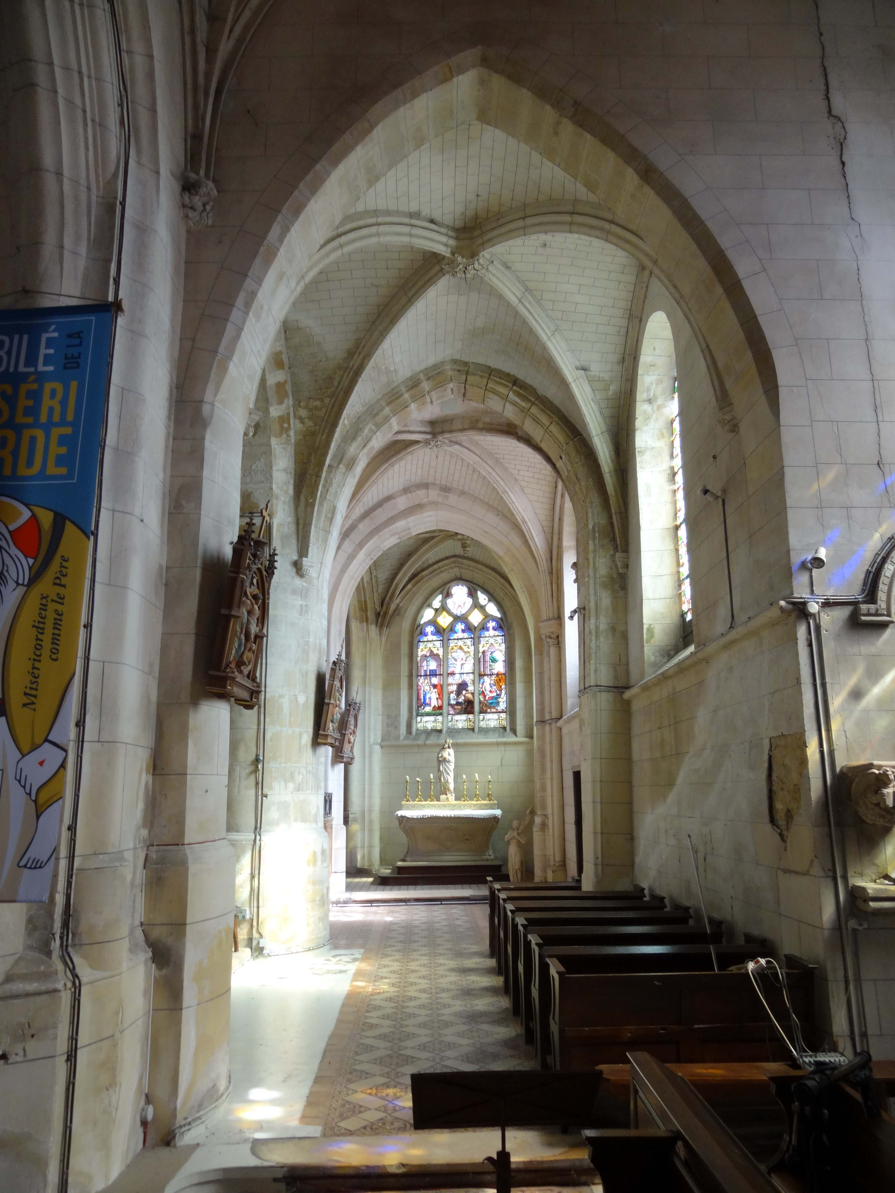 Intérieur de l'église - voir titre.